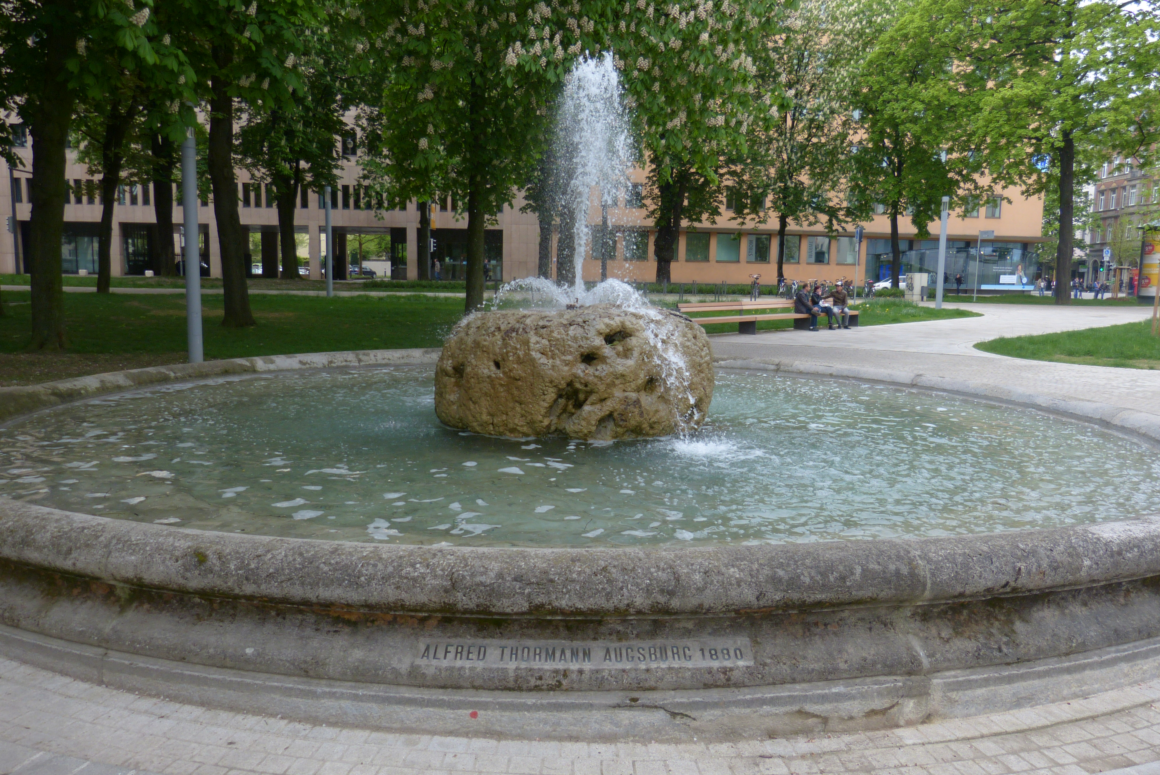 Der Thormann-Brunnen in Augsburg.